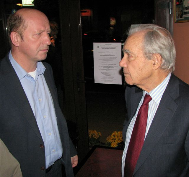 Kazimierz Piotr Zaleski (C. Pierre Zaleski) (b. March 2, 1928 in Paris) - Polish scientist (nuclear energy) and Maciej Płażyński (1958-2010) - Polish politician.